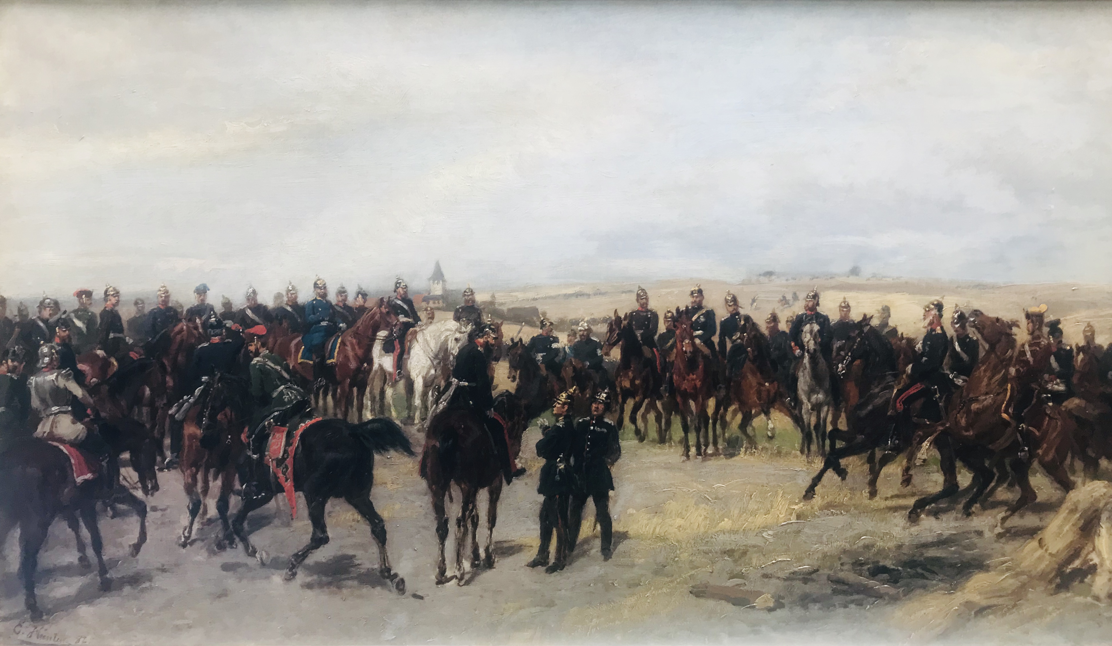 Emil Hünten, Generalmajor von Rauch meldet dem scheidenden Kommandierenden General Wilhelm Graf zu Stolberg-Wernigerode, Ölgemälde, 1882